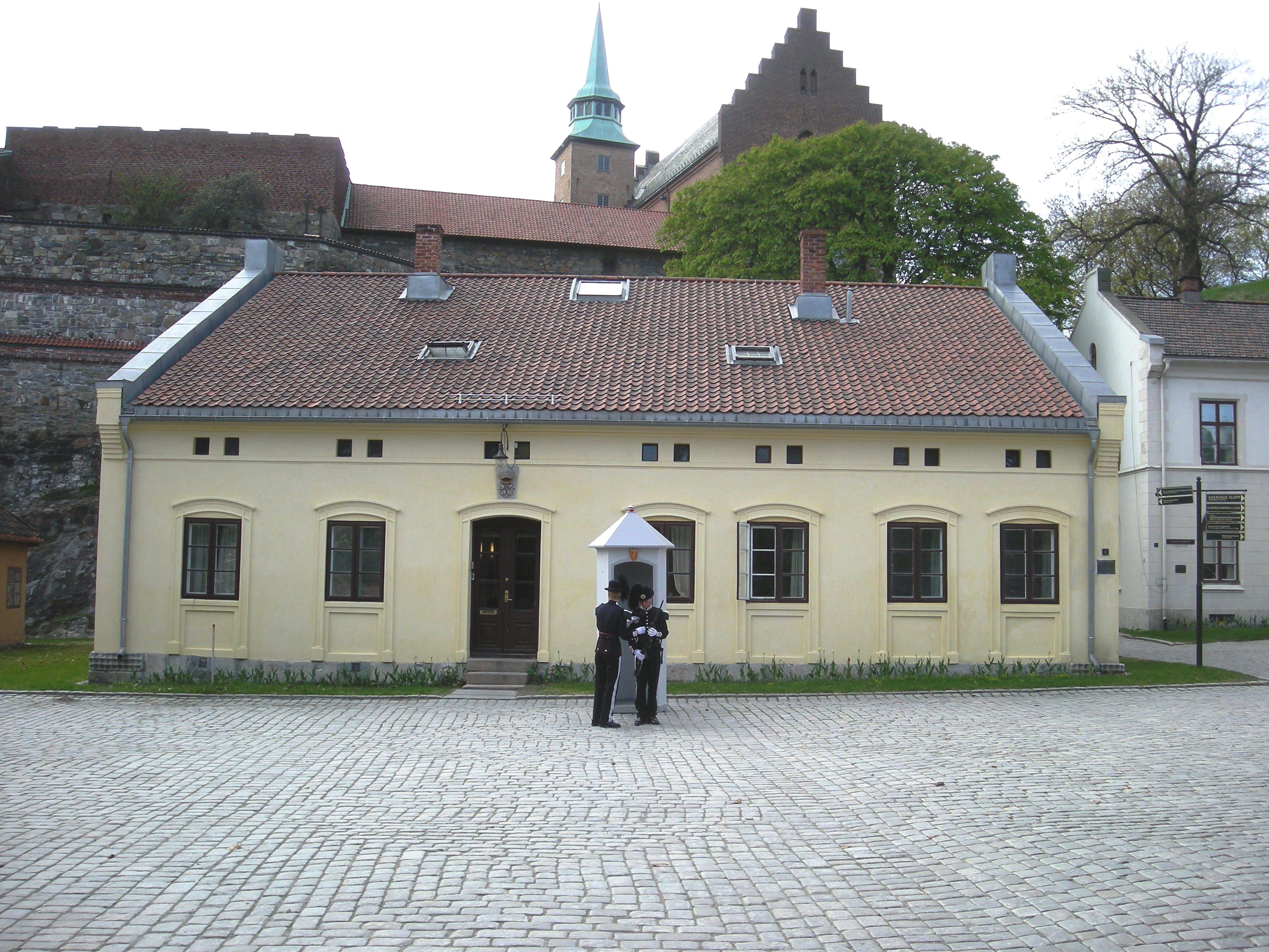 Gardister foran Hovedvakten på Michael von Sundts plass på Akershus indre festningsområde